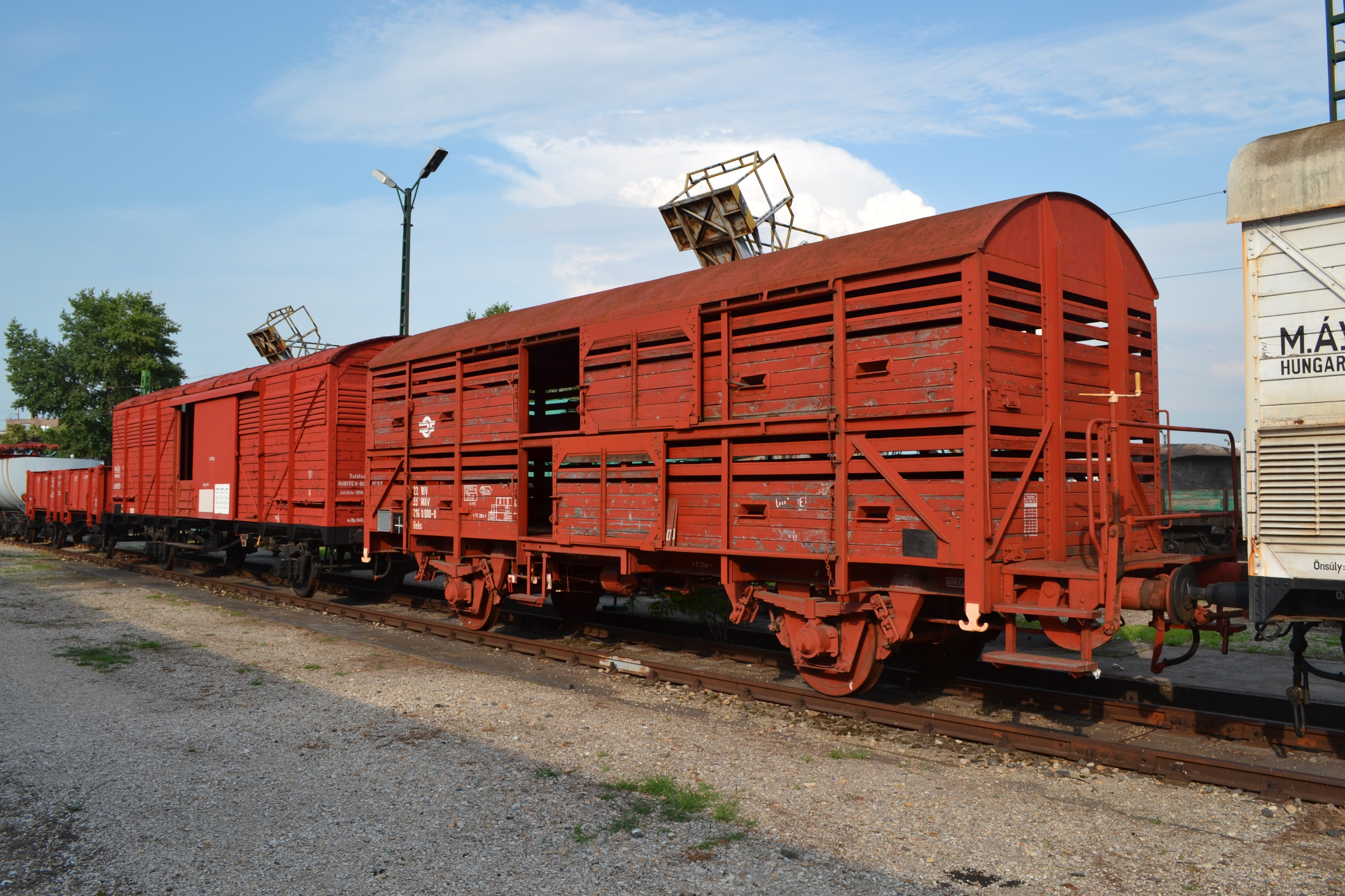 Budapesti Magyar Vasúttörténeti park